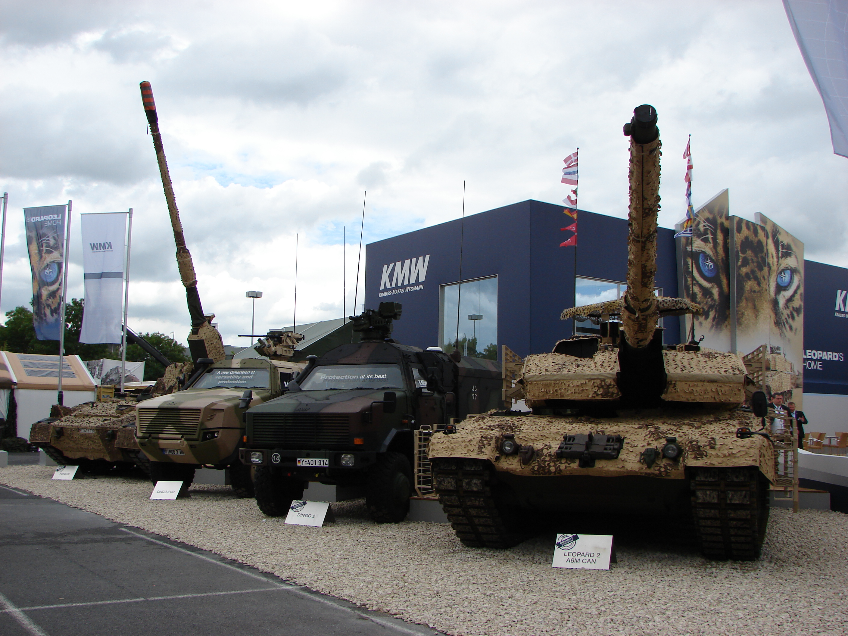 KMW à Eurosatory 2012